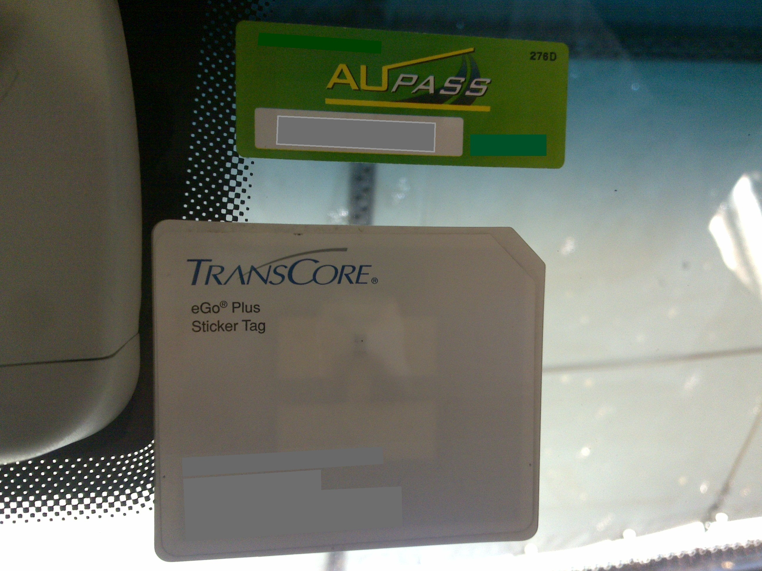 Sticker Tag usados en los Peajes Electrónicos de las carreteras de Argentina